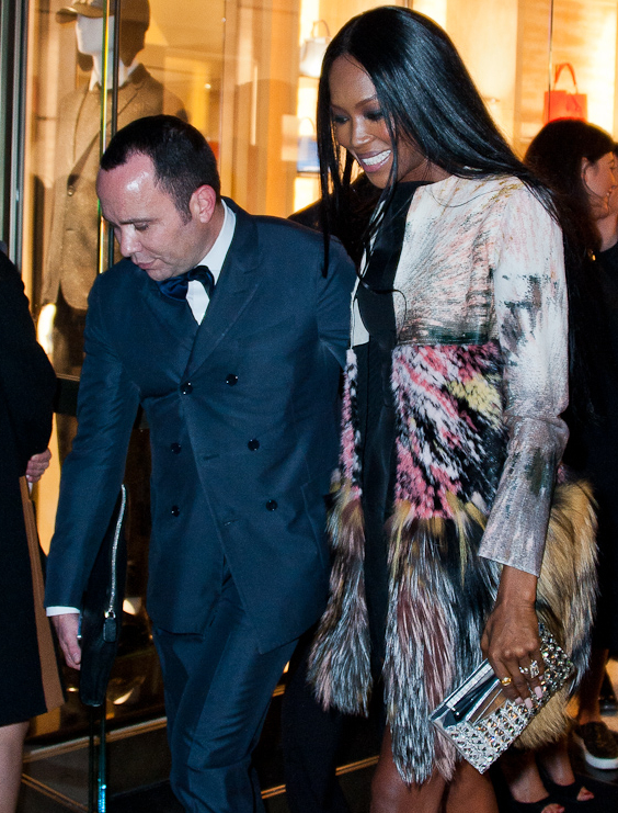 Fendi store opening - Naomi Campbell